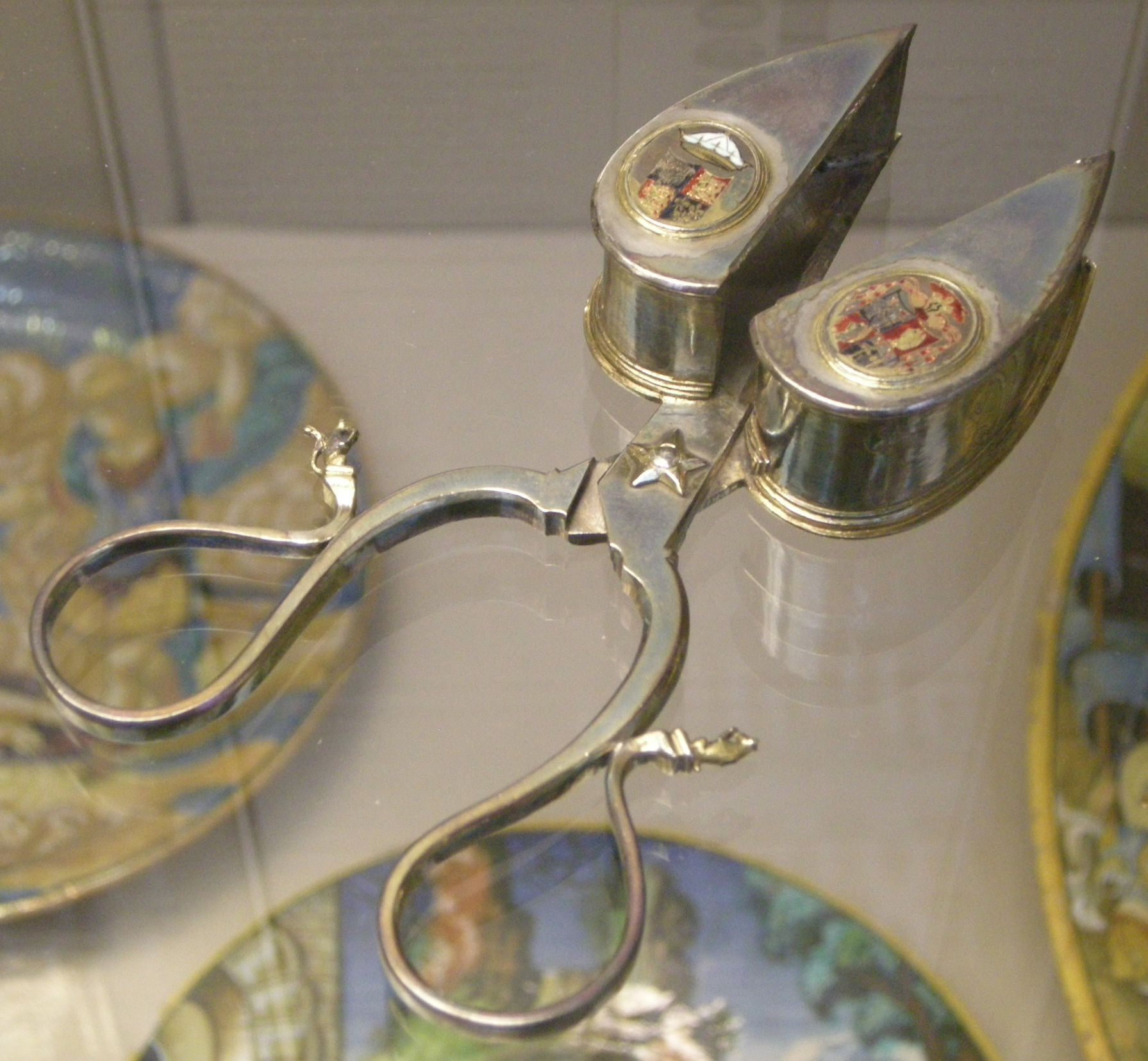 Italia, spegnicandela, 1512-14 circa, probabilmente appartenuto al cardinale Bainbridge